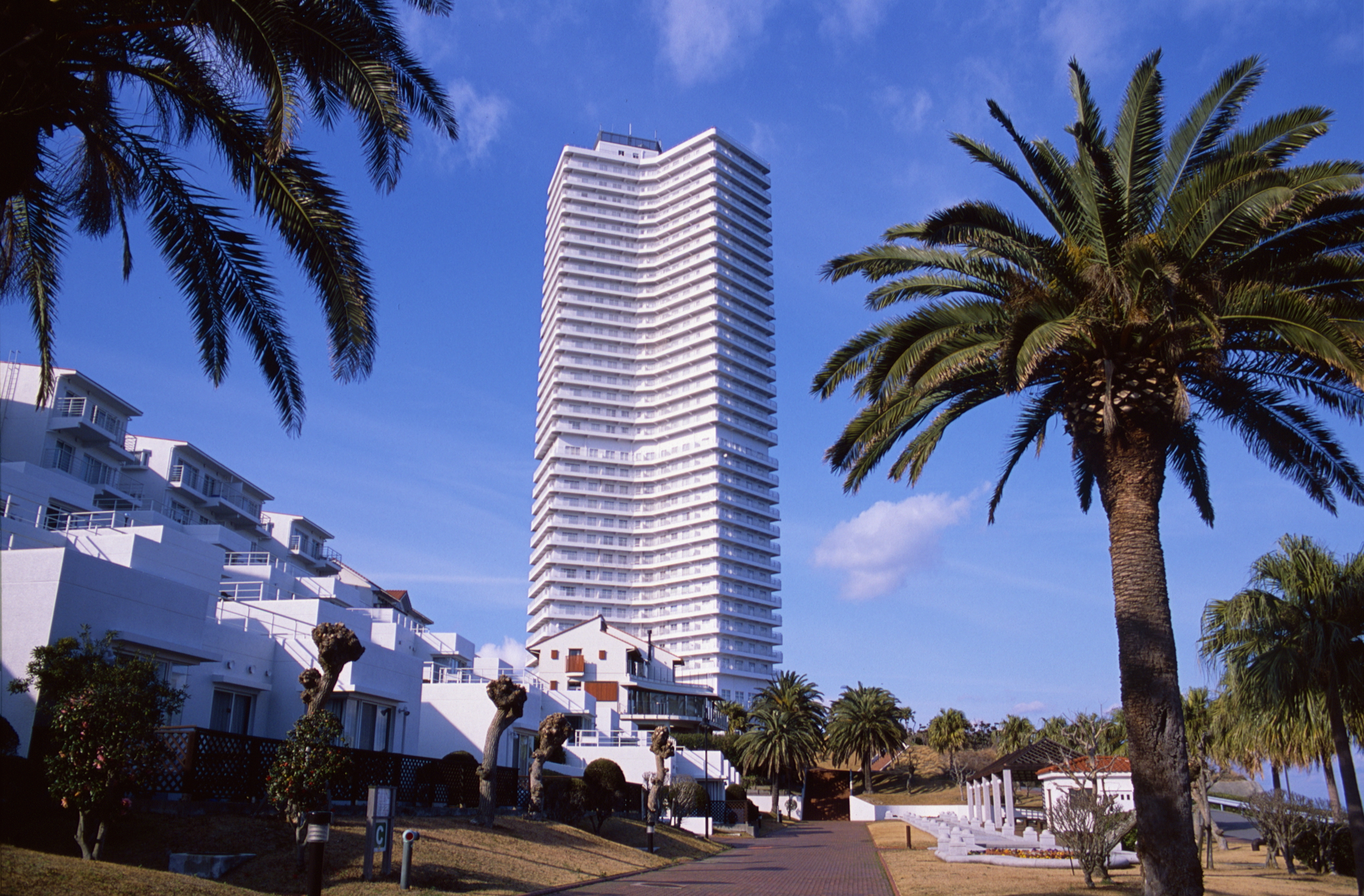 愛知県知多郡南知多町チッタナポリ内のナポリタワー